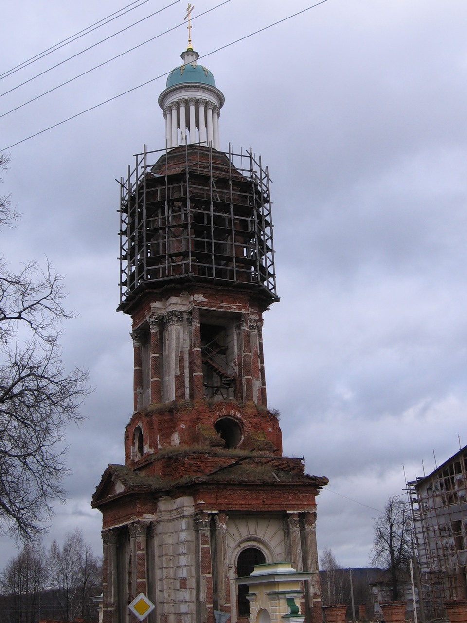 Колокольня Троицкого собора (Москва и Московская область, Яхрома, город Яхрома, Конярова улица, 6)